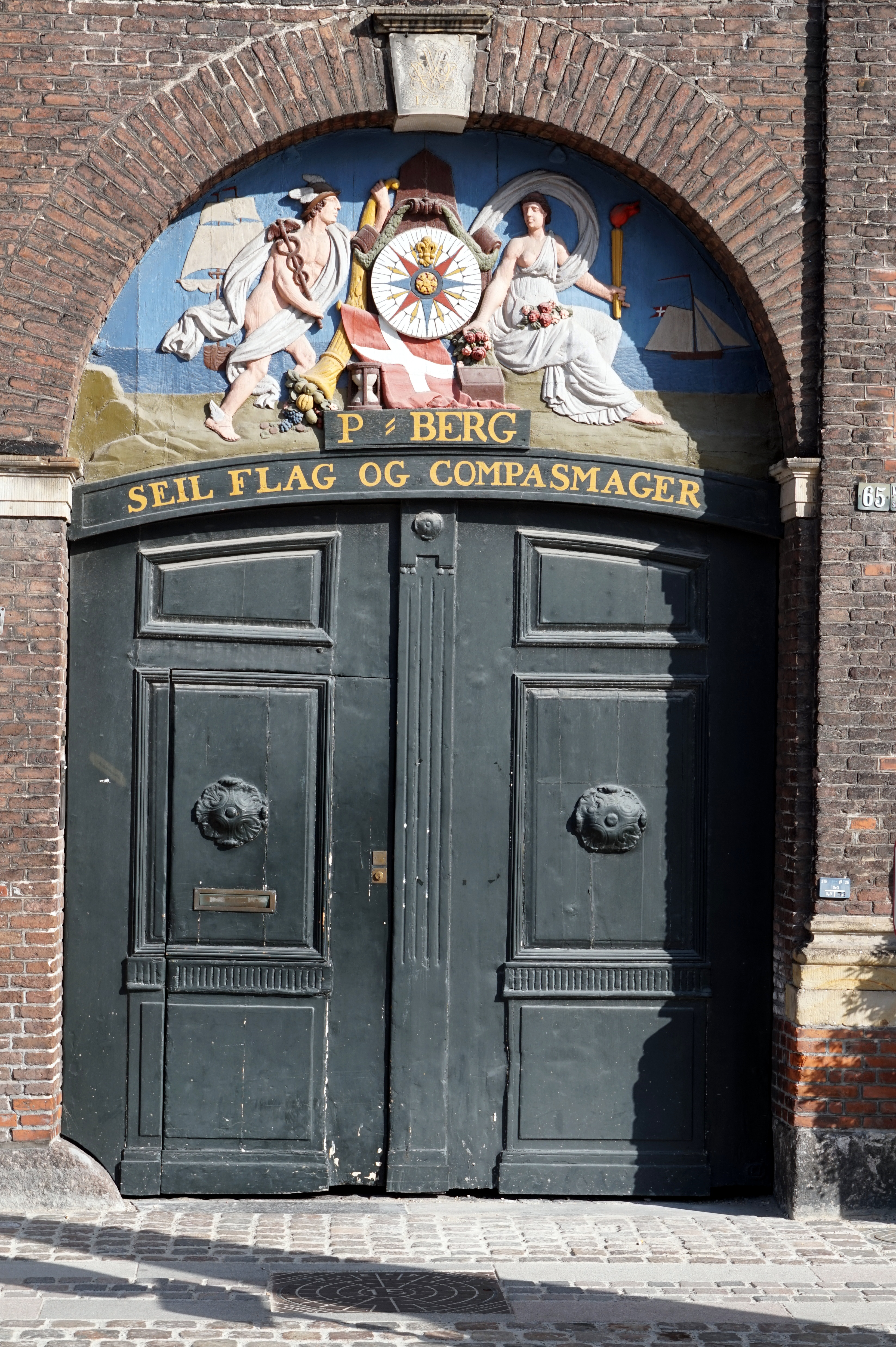 Wooden door at Nyhavn 65 in Copenhagen, Denmark